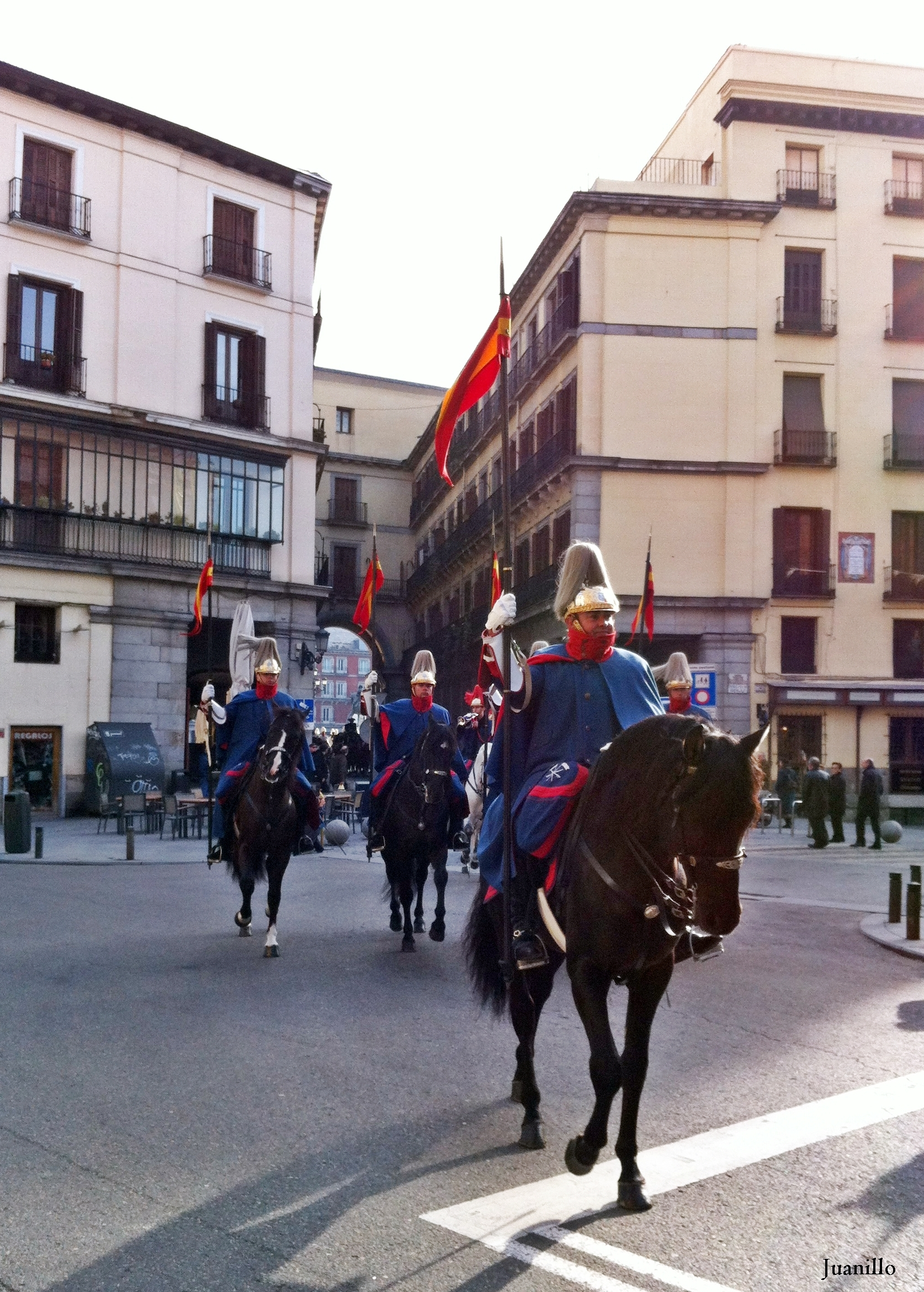 Batidor del EER con lanza metálica modelo 1905